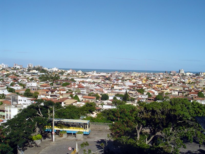 Vista da Cidade de Macaé Foto: Gladstone P. Moraes Trabalho Próprio